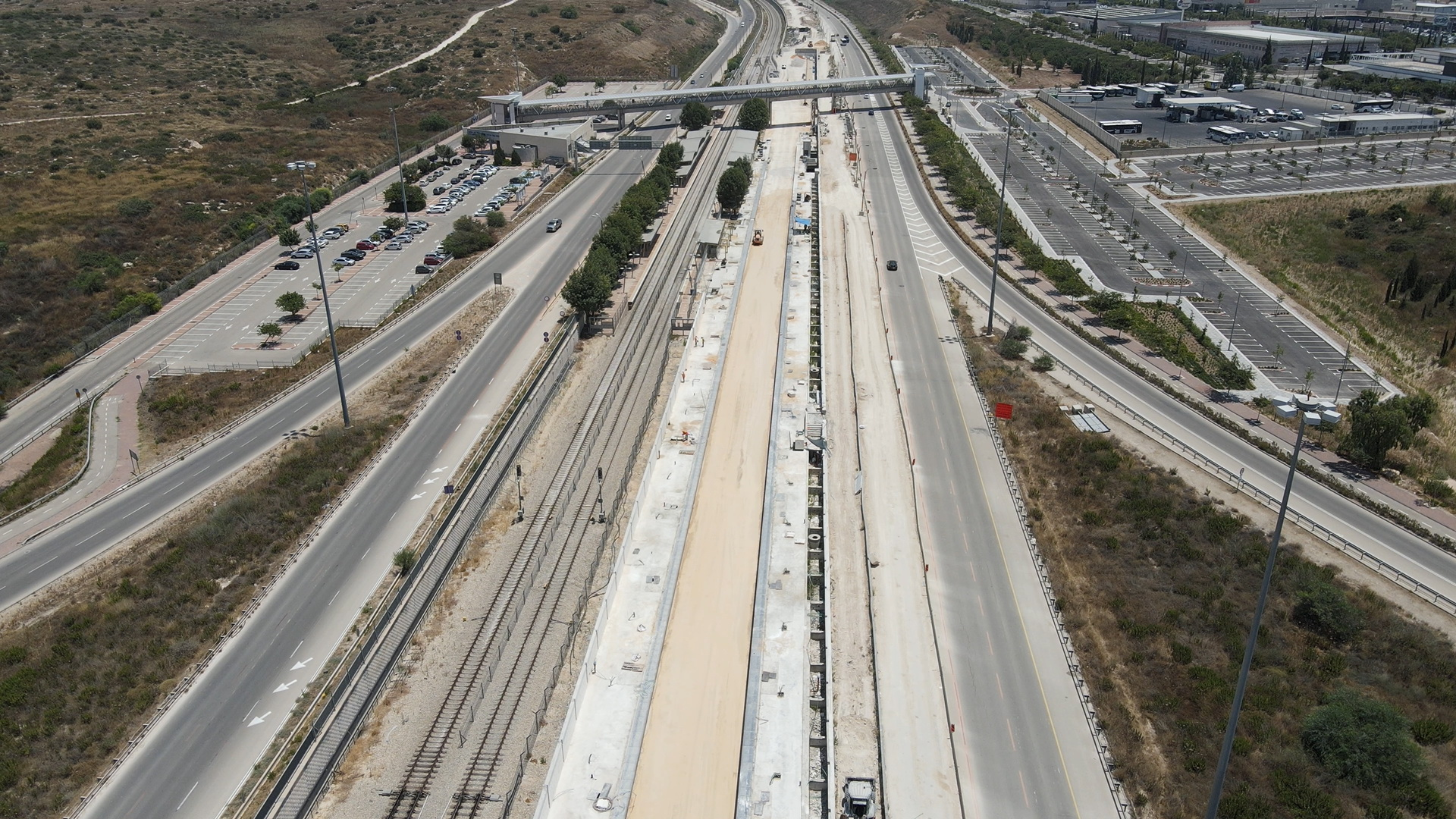 בתמונה גשר הולכי רגל החדש ו2 הרציפים החדשים הנוספים לכיוון ירושלים בבנייה